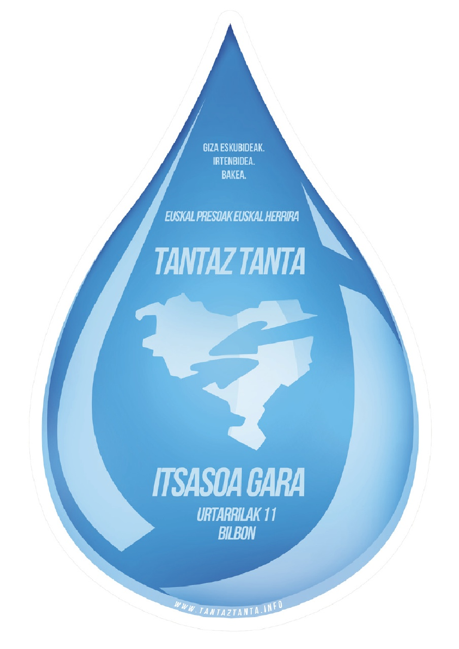 Tantaz Tanta ekimenaren irudia